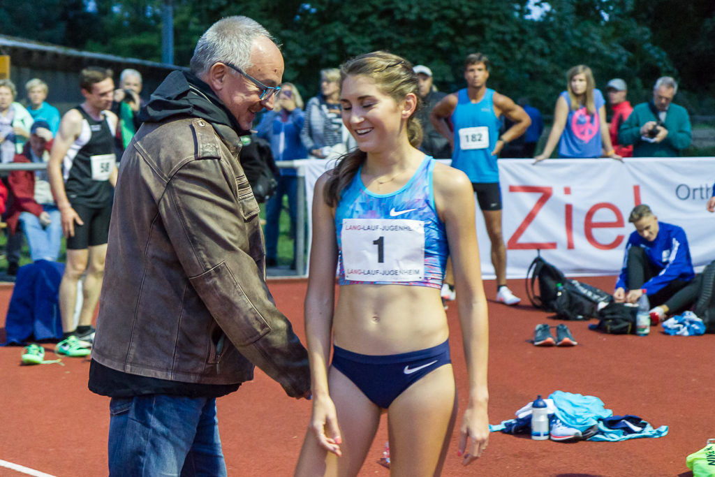 Abendsportfest des TSV Pfungstadt am 6. September 2017.